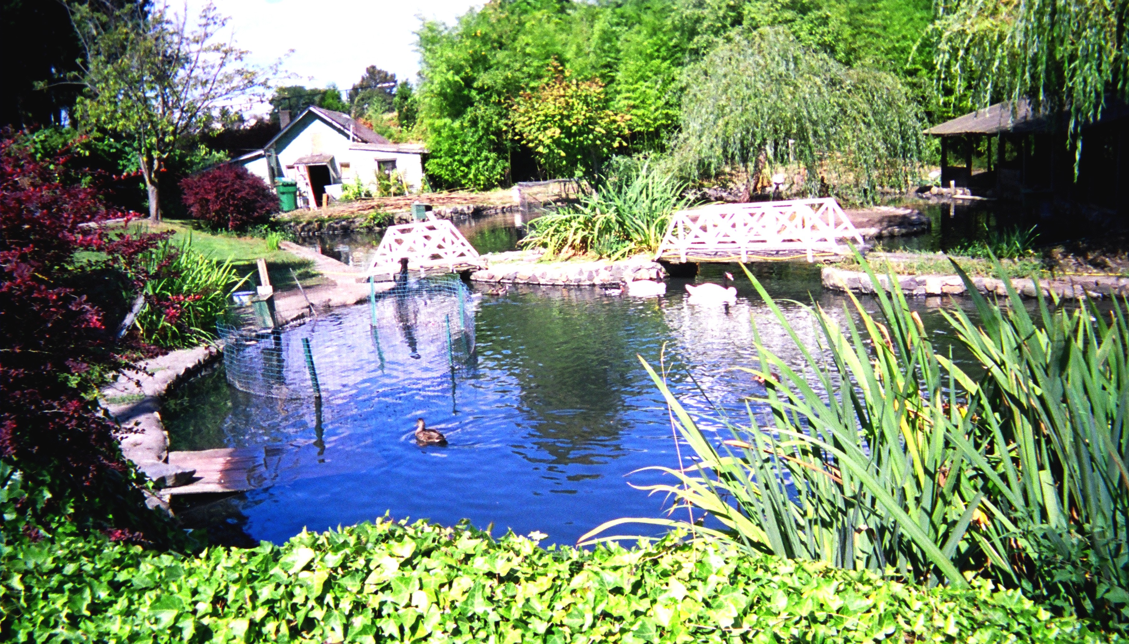 Sunny Walter-Pillings Pond, lageto en la norda parto de Seatlo, kie oni konservas kaj vartas ekzotikajn akvobirdojn: cignojn, anserojn, anasojn ks